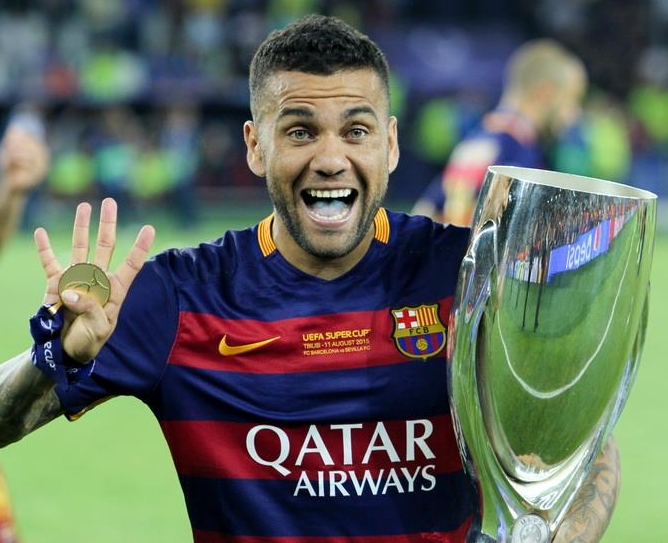 Нагородження переможців матчу за Суперкубок УЄФА 2015 року у Тбілісі. Грузія